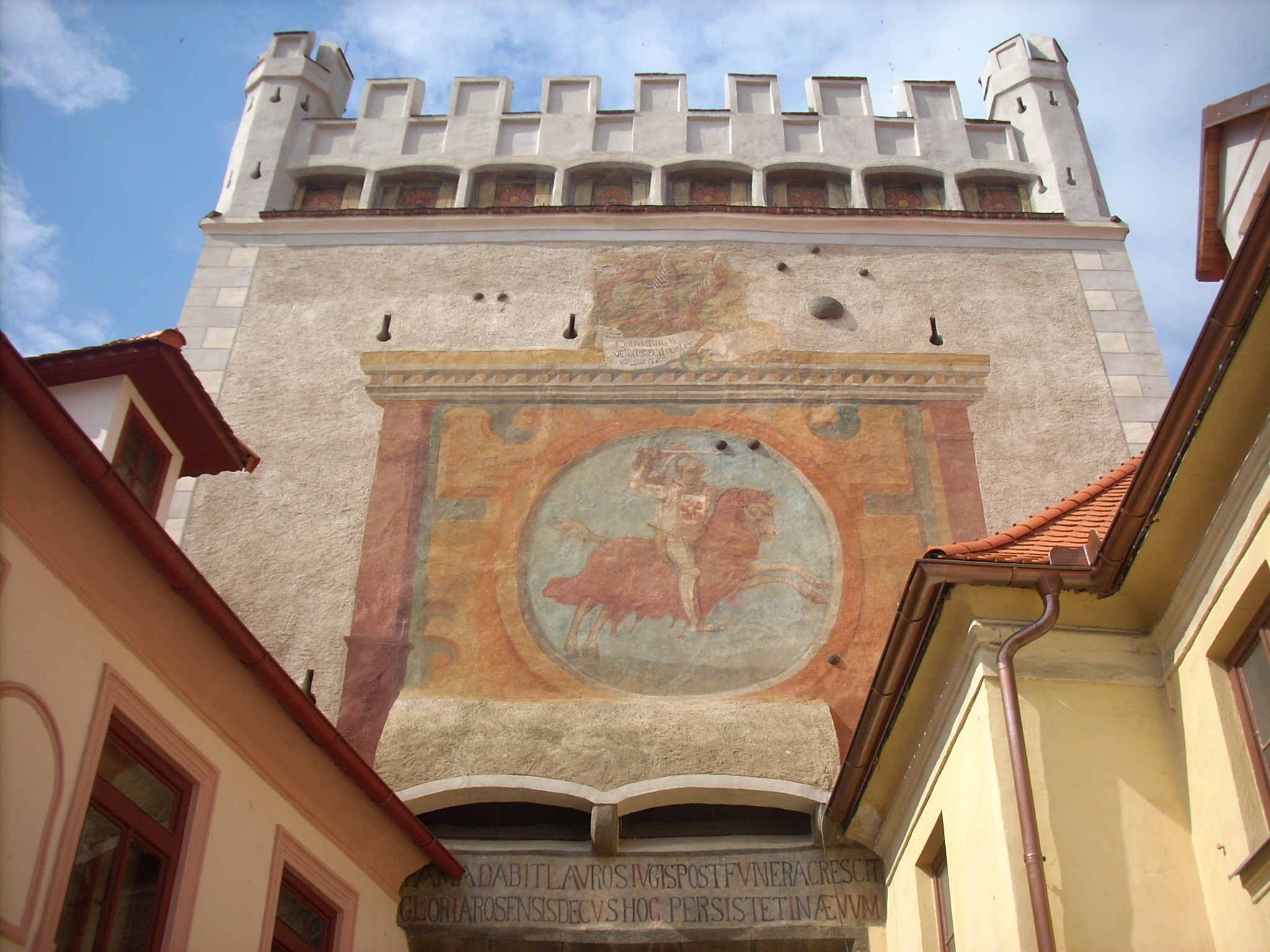 Městské opevnění - Písecká brána, bašty, parkánová a hradební zeď (Prachatice), kolem historického jádra města, Prachatice